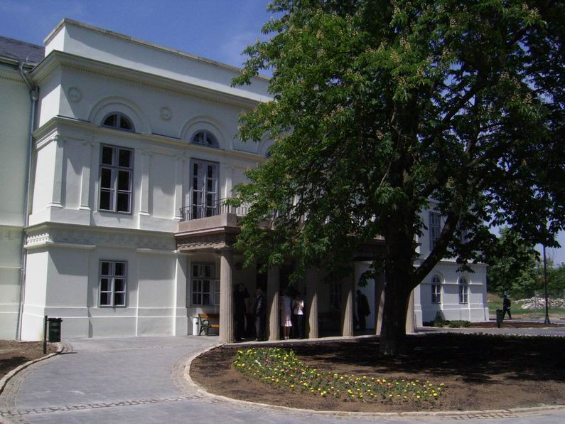 Saját készítésű kép, a Mátra Múzeum átalakítás utáni, megnyitó ünnepségen készült. Erbeszkorn Tamás